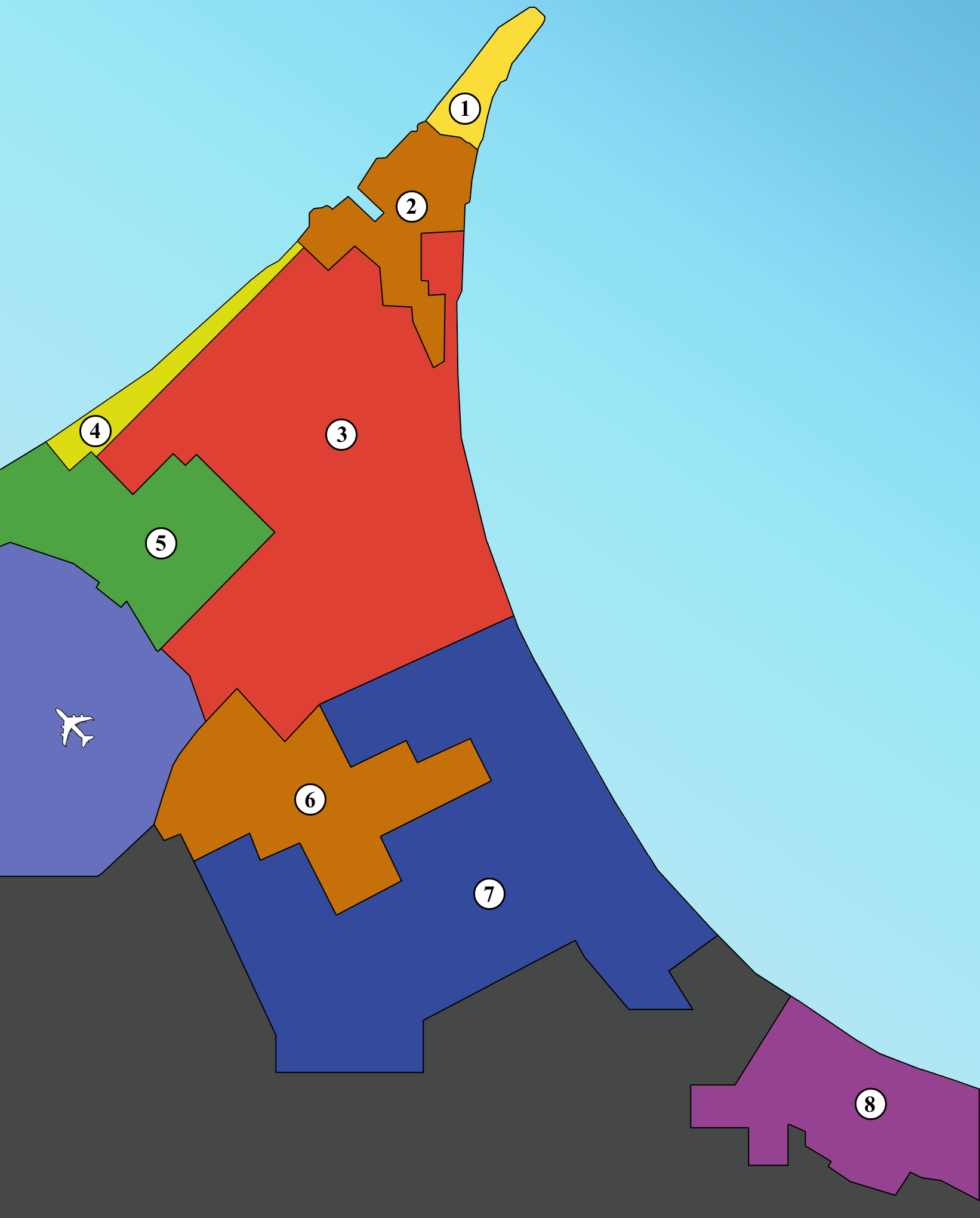 1: Ейская коса, 2: Припортовая зона, 3: Купеческий город, 4: Таганрогская набережная, 5: Военный городок, 6: Промзона, 7: Новый жилой массив, 8: Широчанка